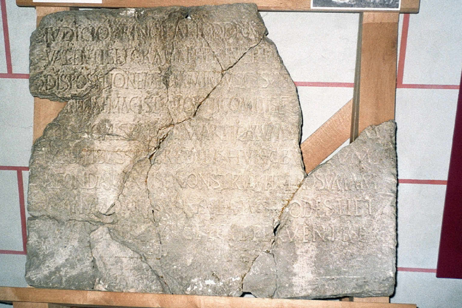 Visegrád-Steinbruch (Burgus Solva 24, Ungarn): Bauinschrift, 372 n. Chr. 1955 bei der Grabung vor dem Eingang des Burgus geborgen. Ausgestellt im Salomonturm (Zweigstelle des Mátyás Király Múzeum), Visegrád.